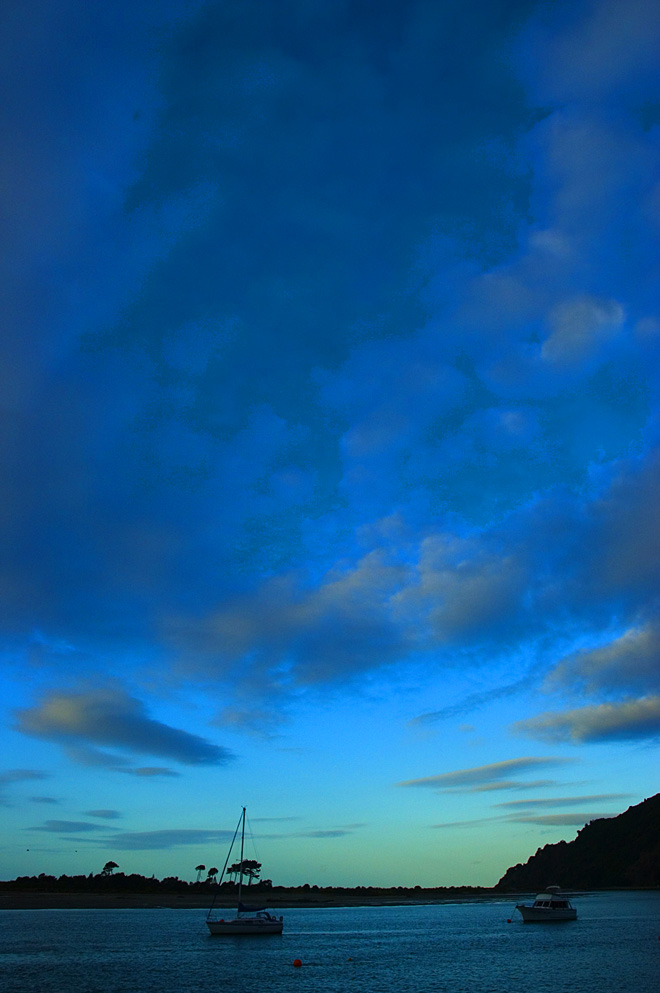 Whakatane Harbour at sunset